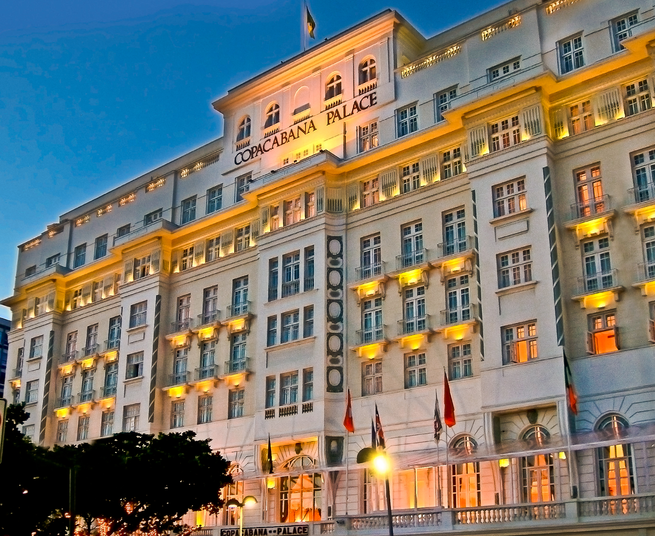 Copacabana Palace Hotel: fachada do edifício ao anoitecer